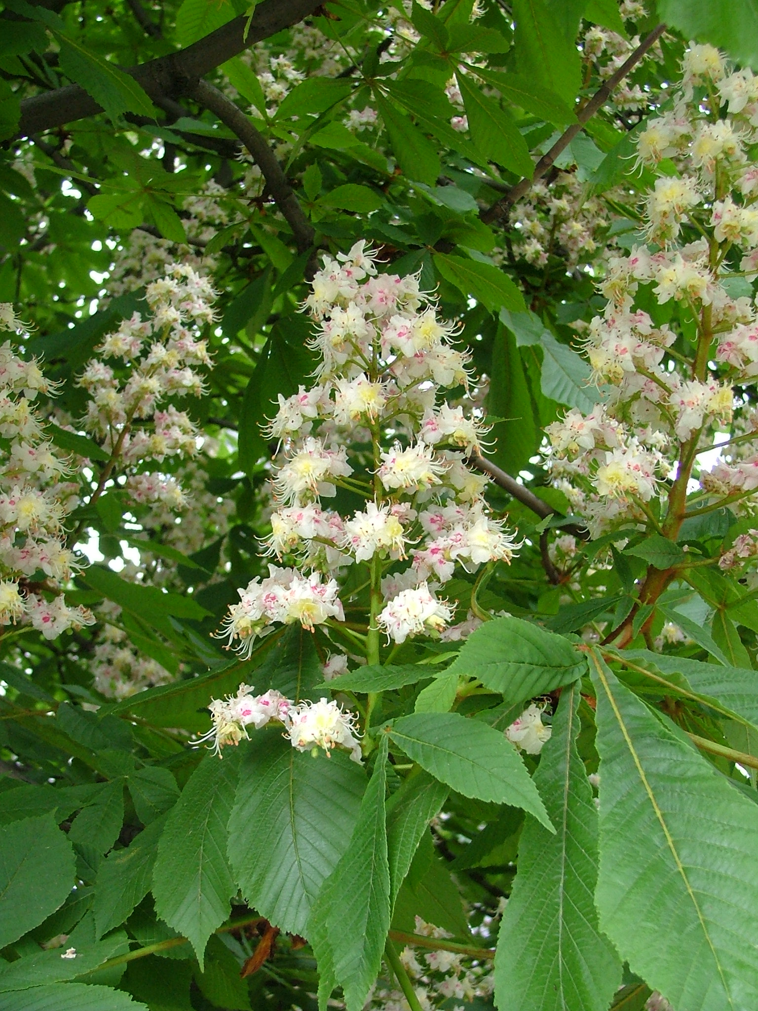 Kasztanowiec - Aesculus L.